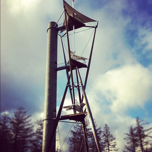 La Tour du millénaire à Gedinne, Belgique réouverte en 2012, style moderne.